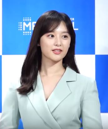 배우 김지원이 28일 오후 서울 명동 메디힐 플래그십 스토어에서 열린 글로벌 마스크팩 브랜드의 신제품 출시 기념행사에 참석했다.